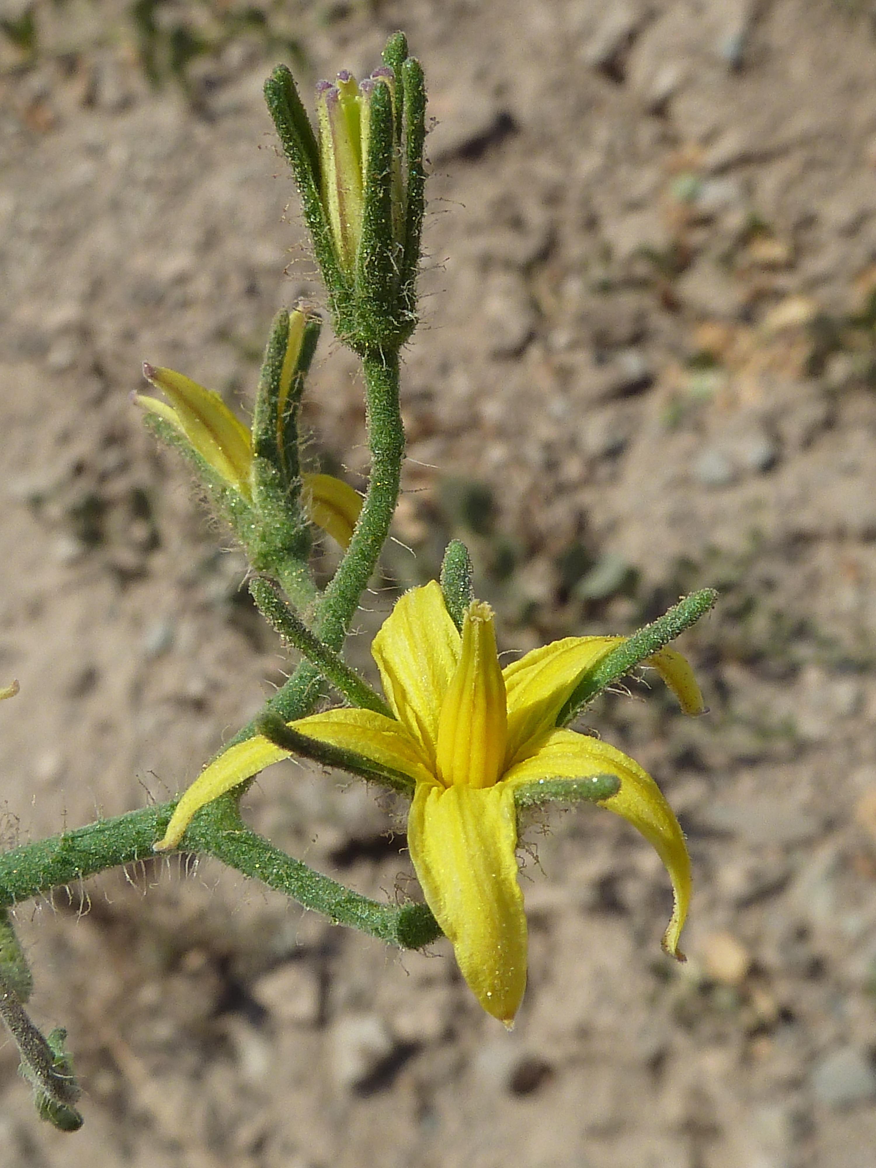 Solanum lycopersicum (Tomatera) : Flores en plena antesis y en antesis incipiente - Rambla del Charco, Águilas (Murcia, España)